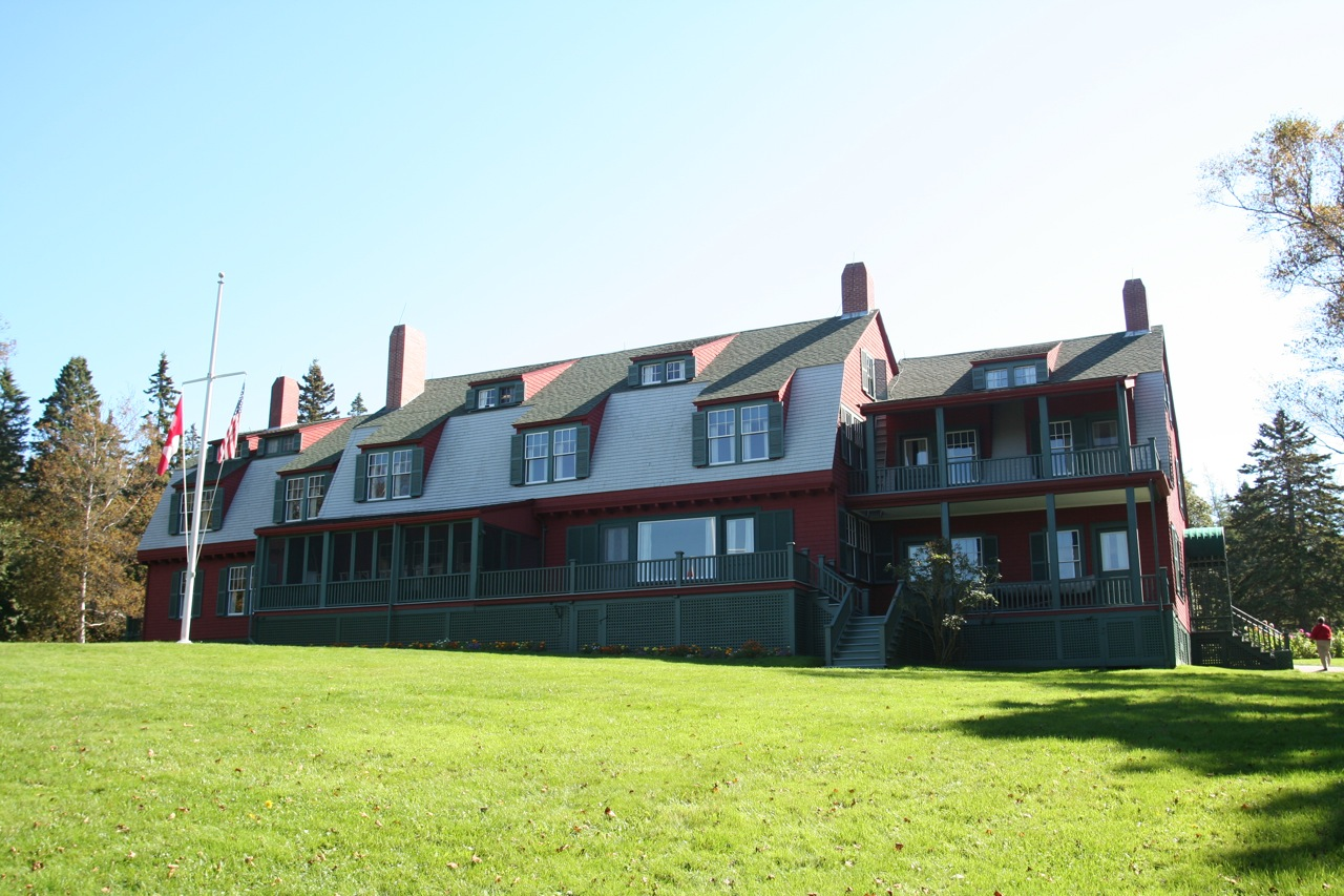 Franklin . Roosevelt Cottage - Nordansicht